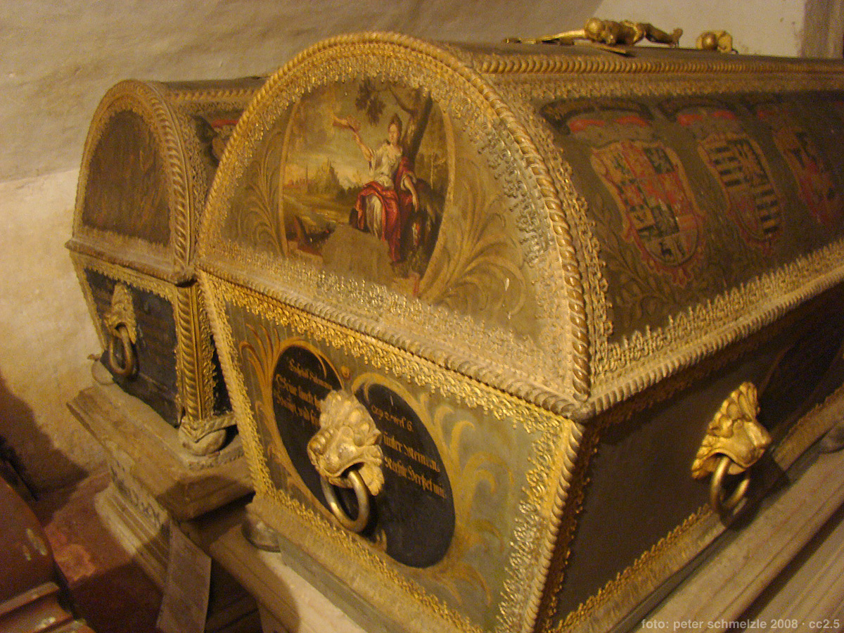 Sarkophage von Herzog Friedrich von Württemberg-Neuenstadt (1615-1682), hinten, und seiner Frau Herzogin Clara Augusta von Braunschweig-Wolfenbüttel (1632-1700), vorne, in der Gruft der Nikolauskirche in Neuenstadt am Kocher